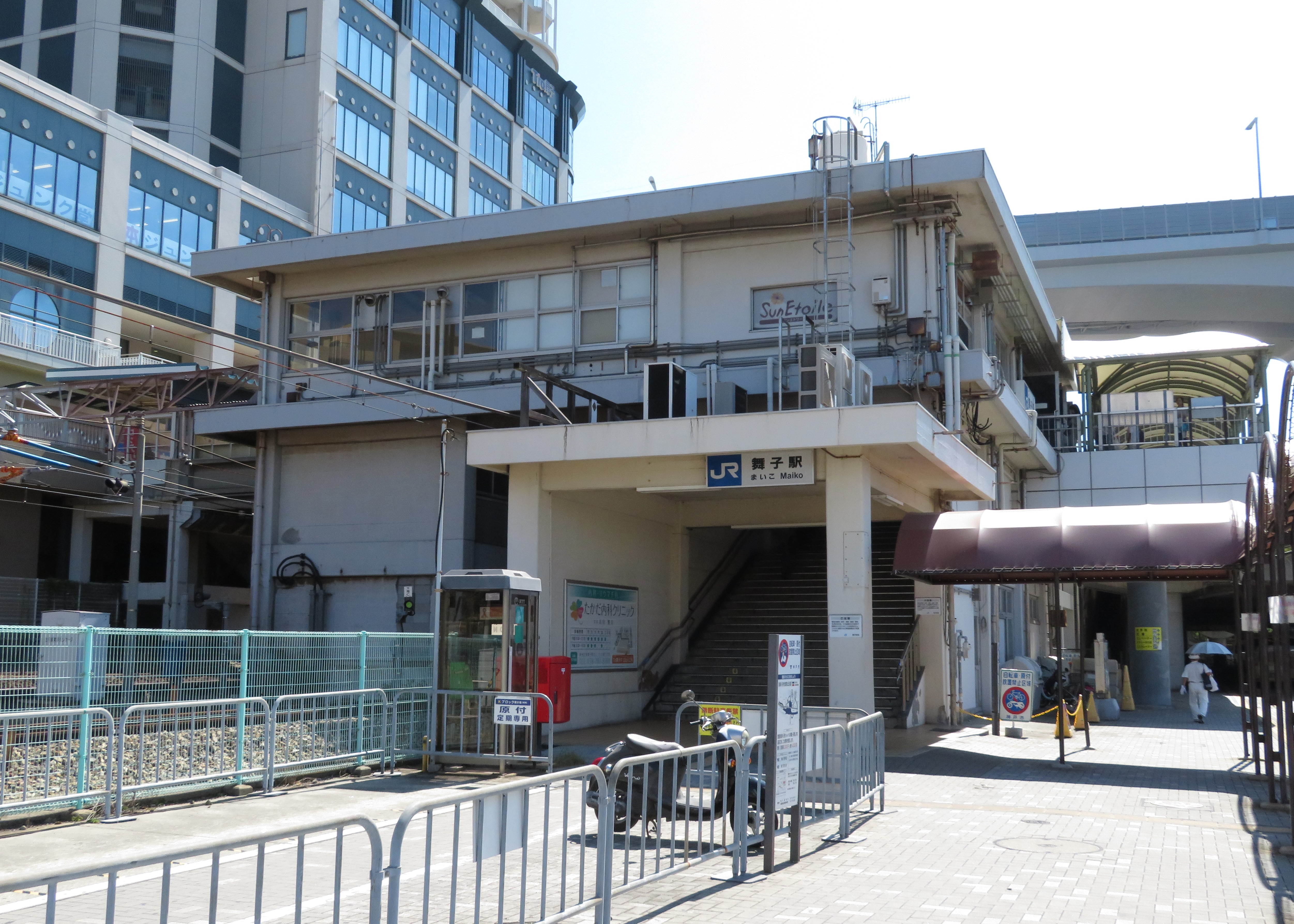 JR舞子駅